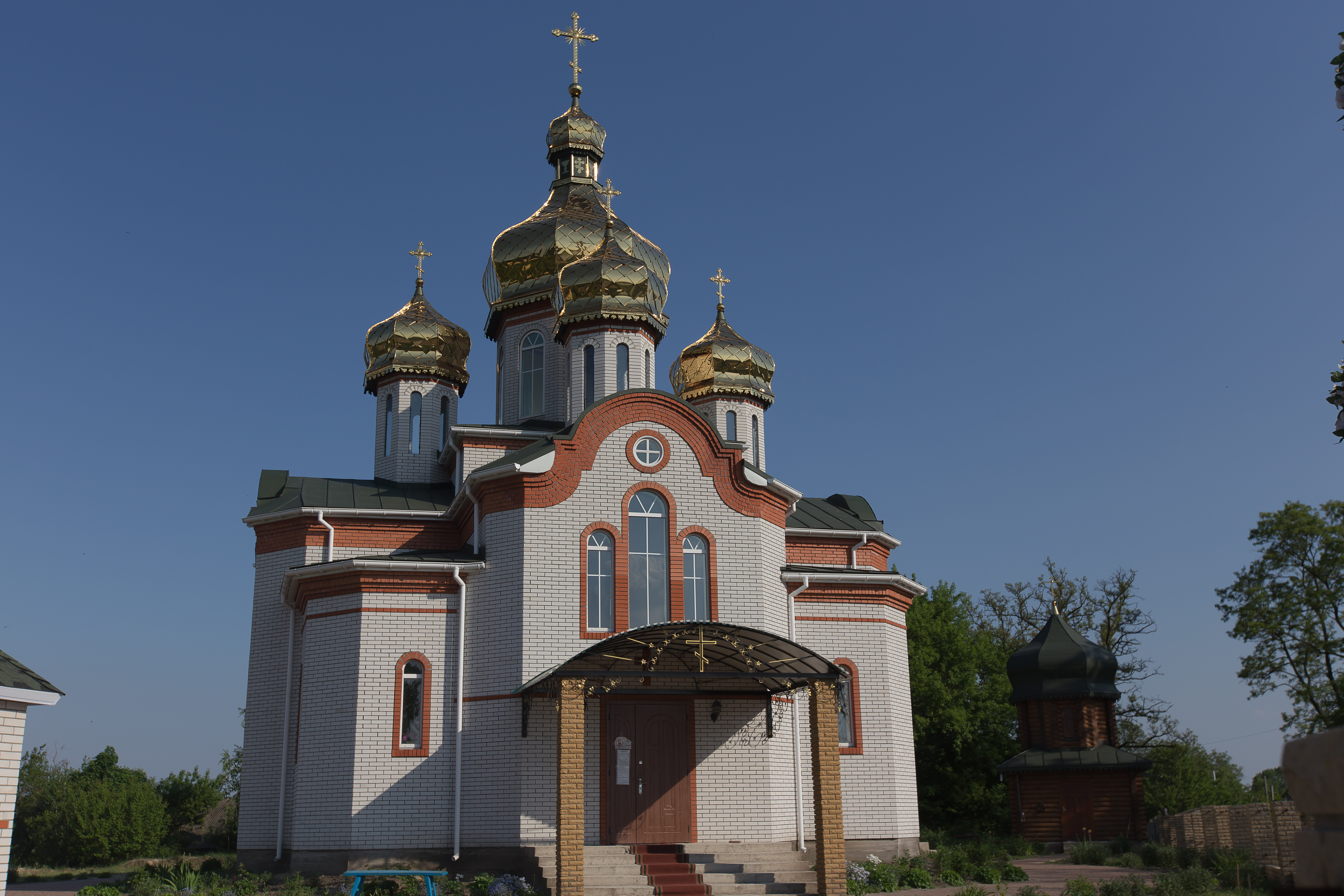 Церковь. с. Сошників. Бориспільської районної Ради Київської області.-2